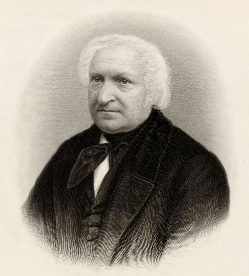 Porträt Julius Campe (1792-1867), Stahlstich von Weger, 1868